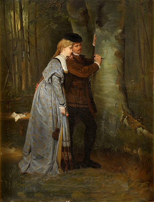 Für immer und ewig.title QS:P1476,de:"Für immer und ewig." label QS:Lde,"Für immer und ewig."